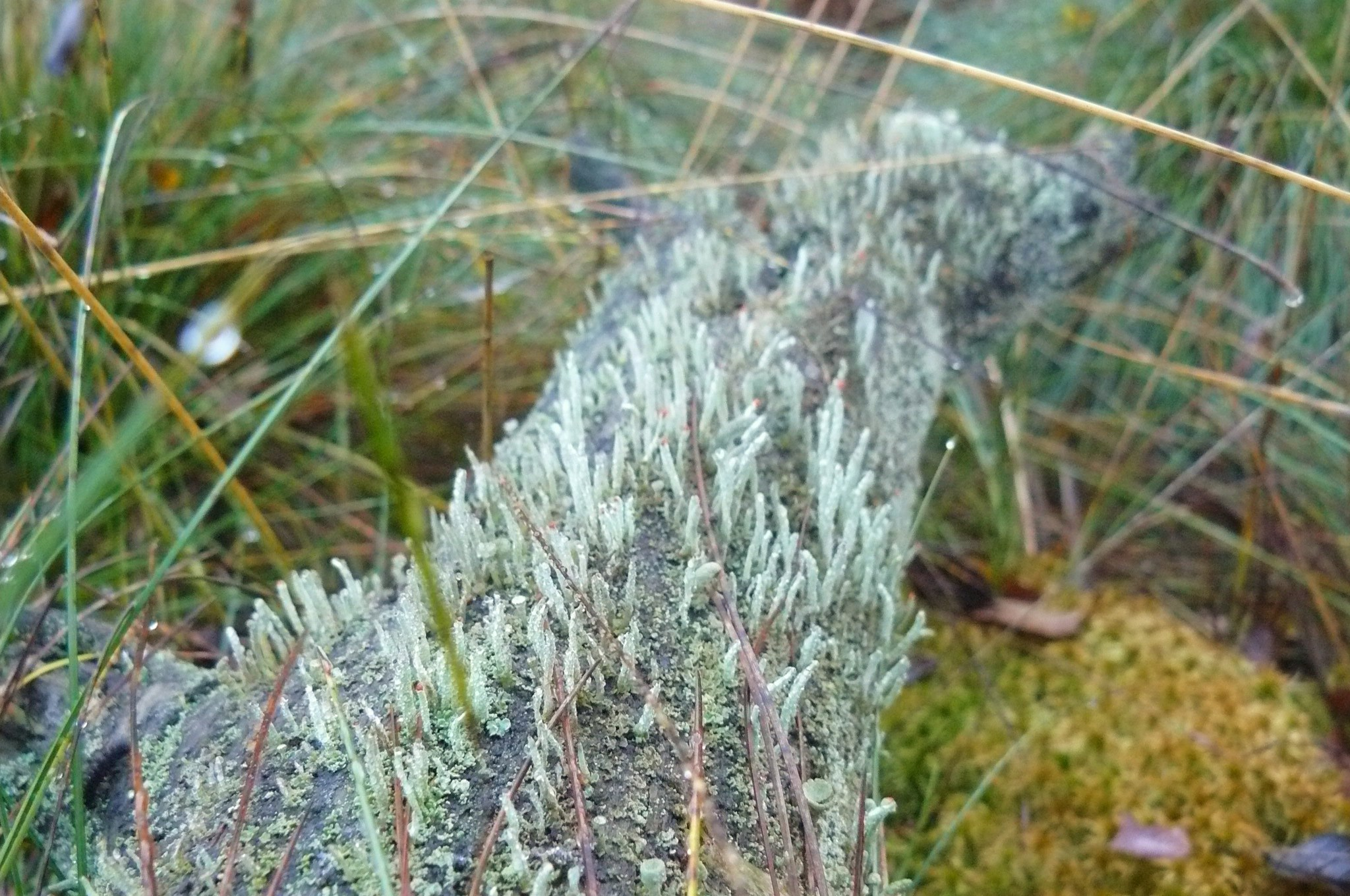 Tereny rezerwatu Mszar Bogdaniec - Obszar Chronionego Krajobrazu Dąbrowy Krotoszyńskie i Baszków-Rochy (okolice Konarzewa).